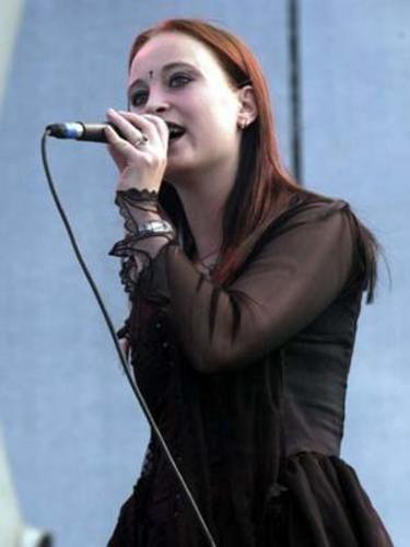 La chanteuse de The Sins of Thy Beloved, Anita Auglend